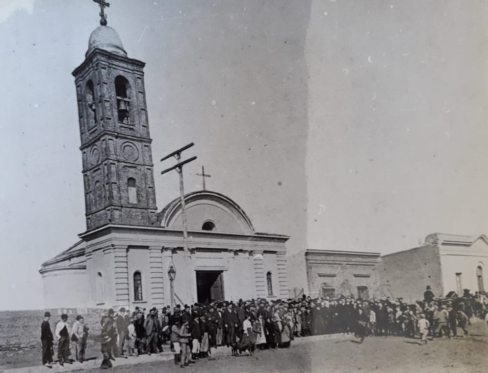 Fotografía tomada el 1º de julio de 1910